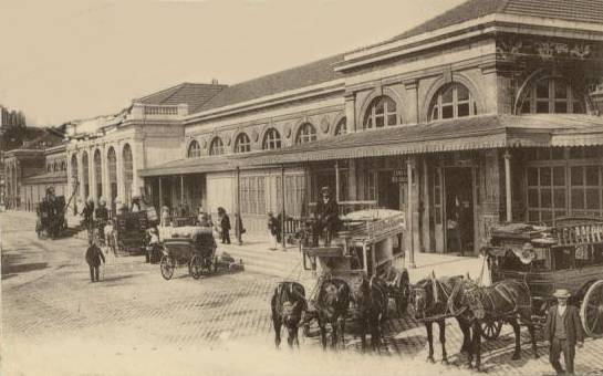 Gare de Cornavin en 1912